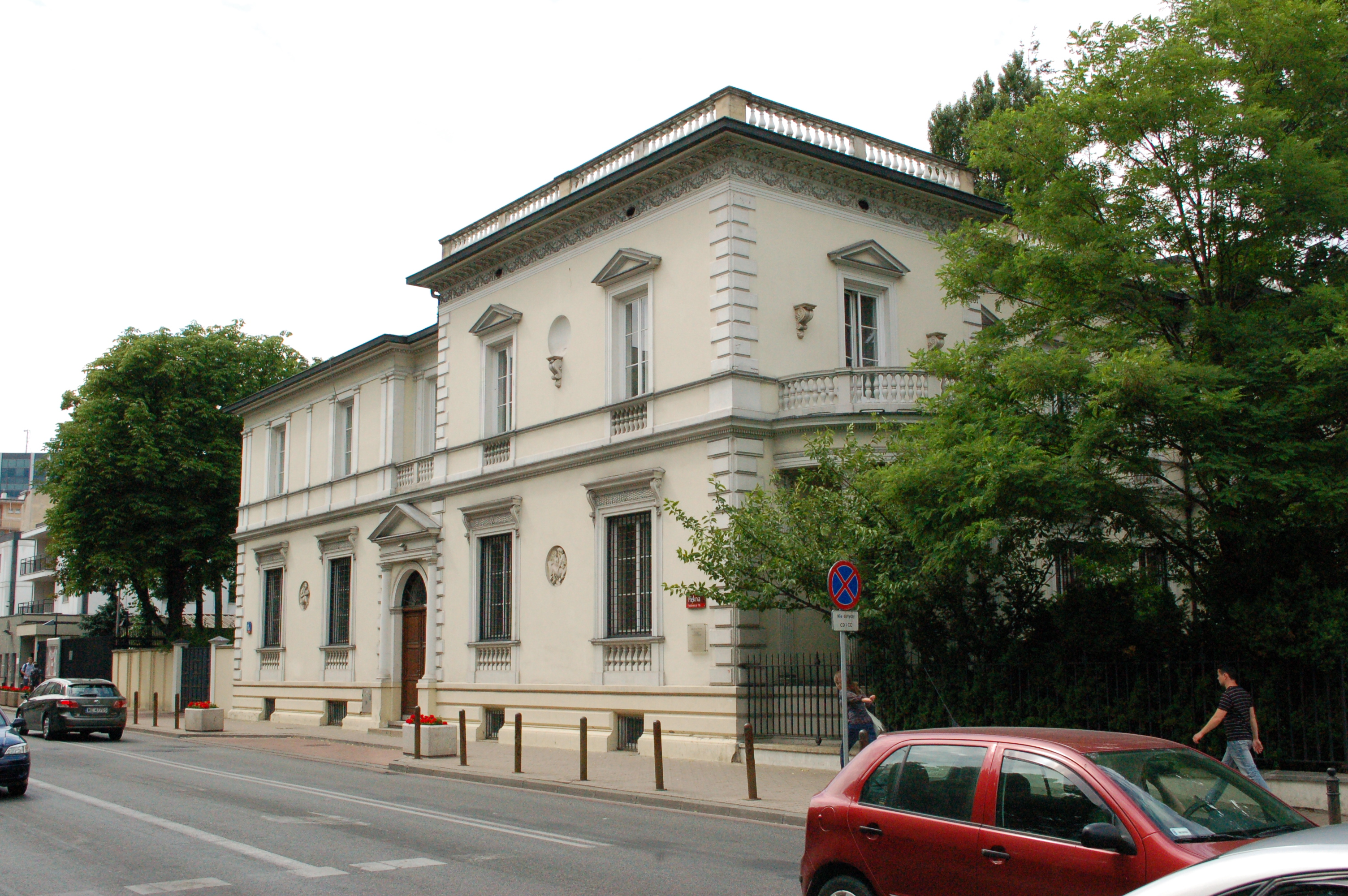 Warschau